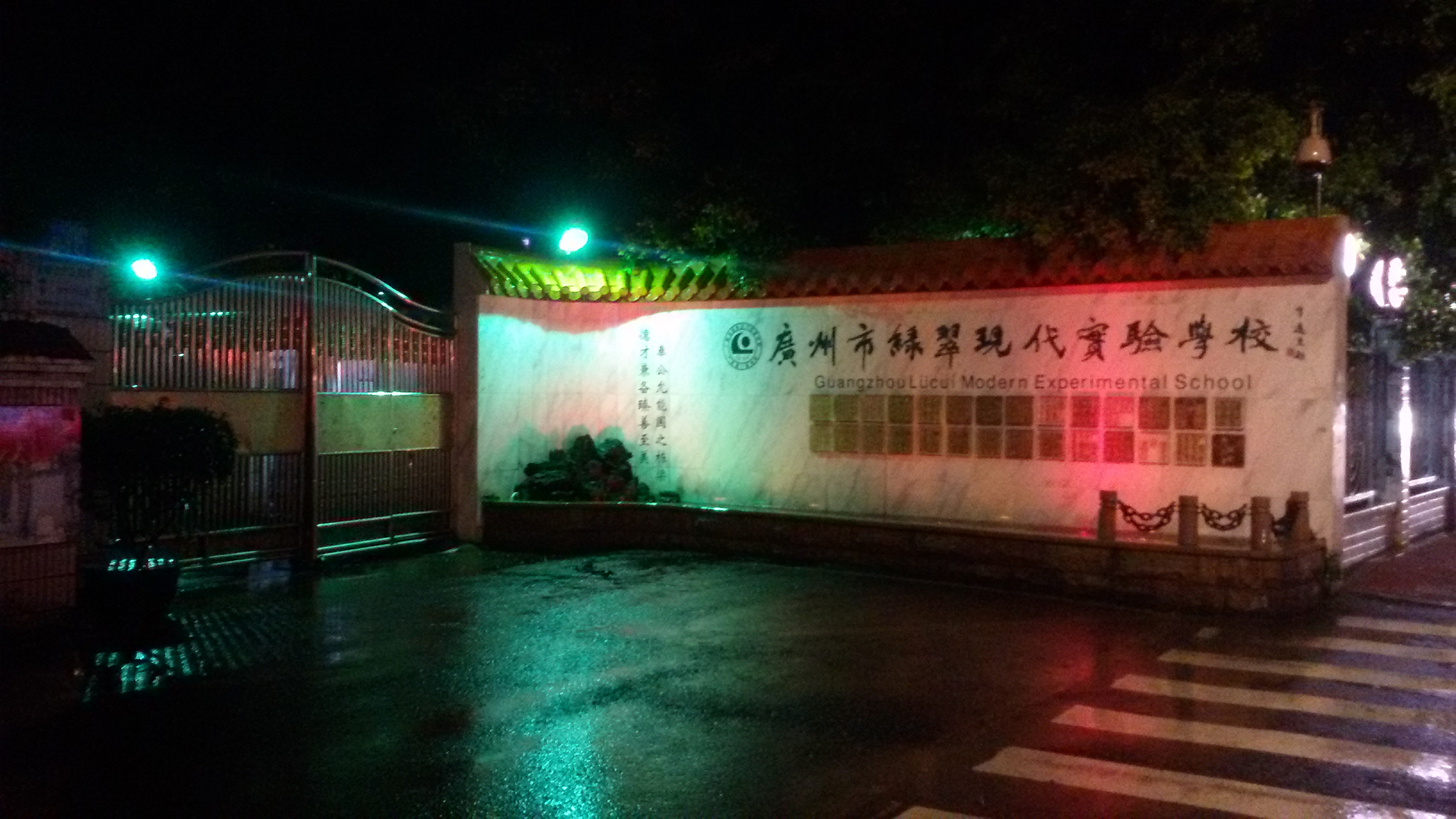 粵語: 綠翠現代實驗學校